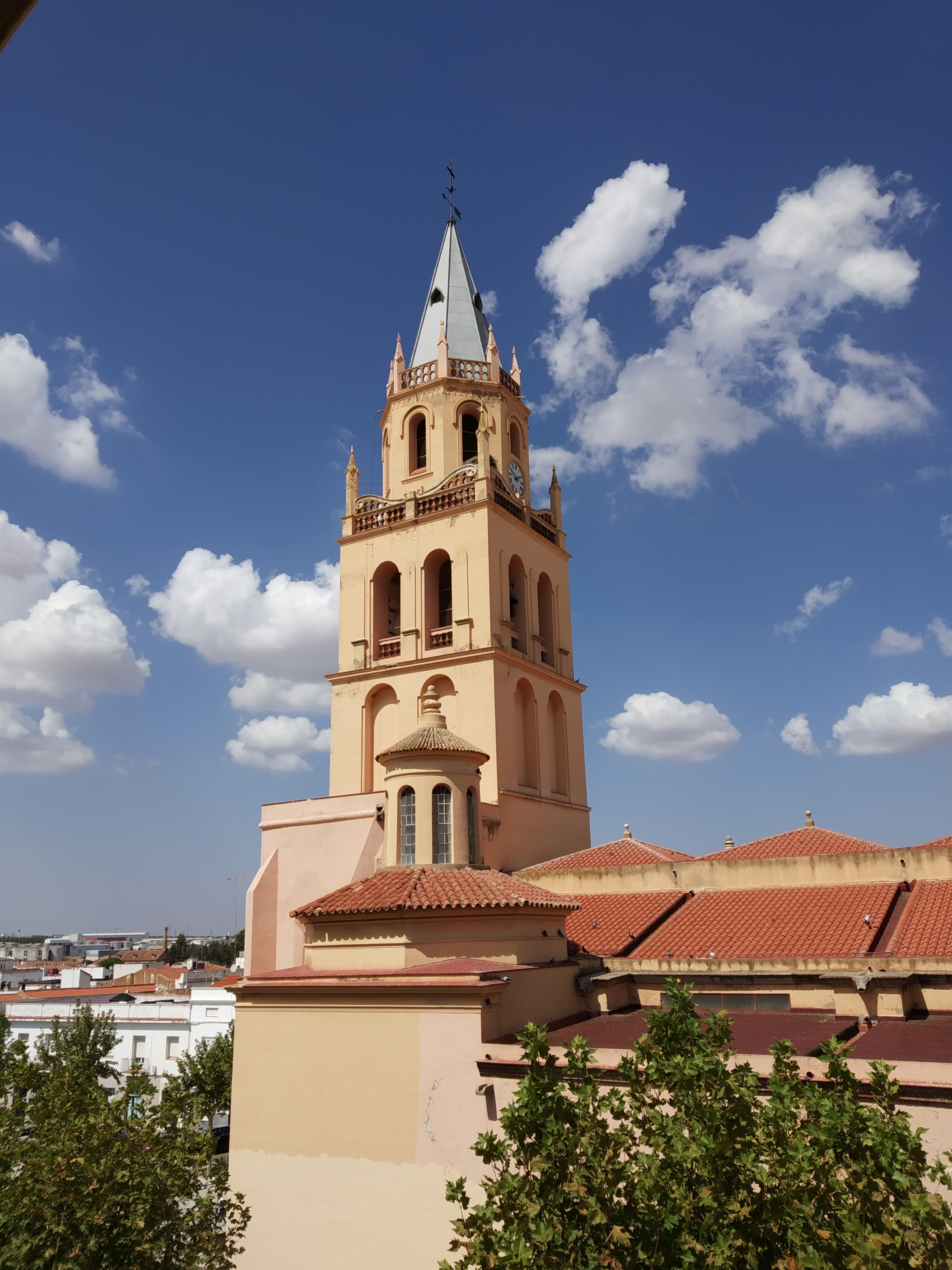 Parroquia de Santa Maria del Valle de Villafranca de los Barros